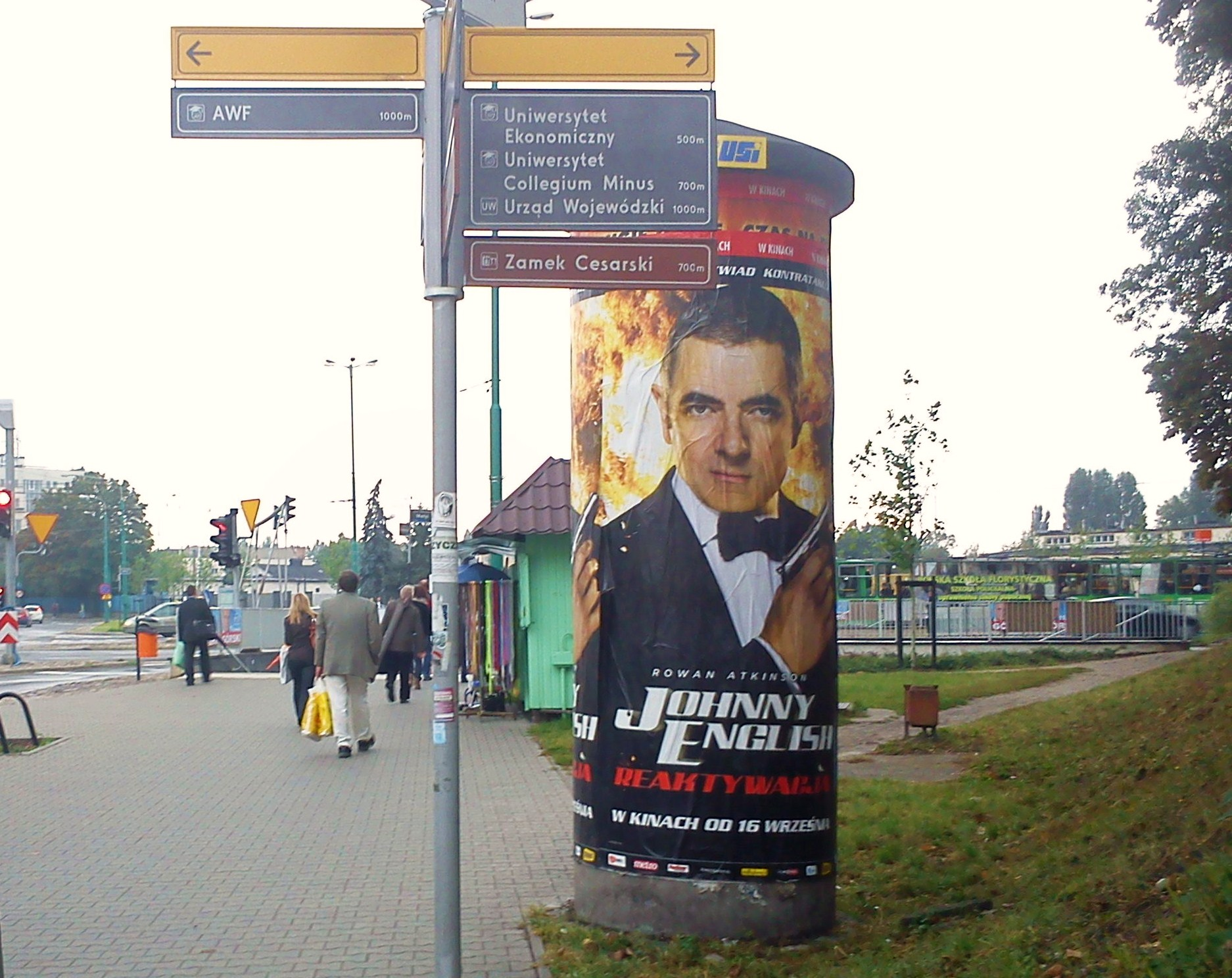 Poznań, Aleje Niepodległości.